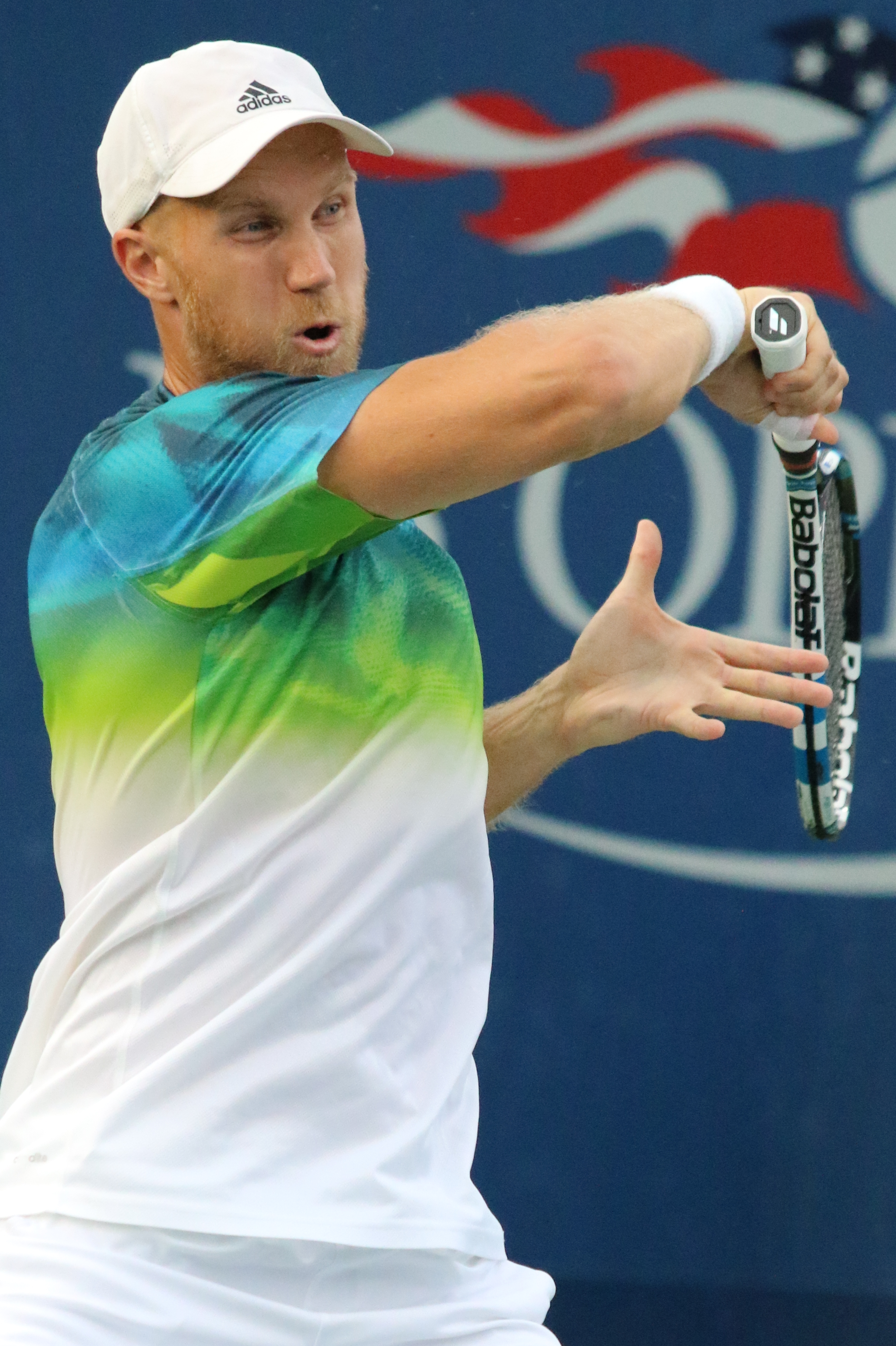 Inglot US16 (9)